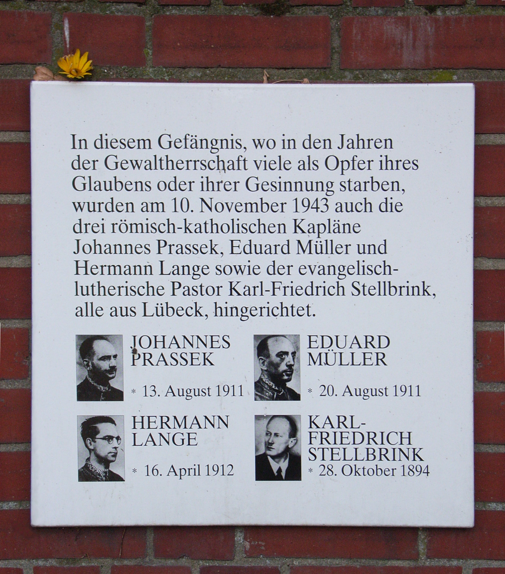 Lübecker Märtyrer: 4 Personen hingerichtet 10. November 1943 in Hamburg / Gedenktafel Wallanlagen - Holstenglacis (UG) Hamburg